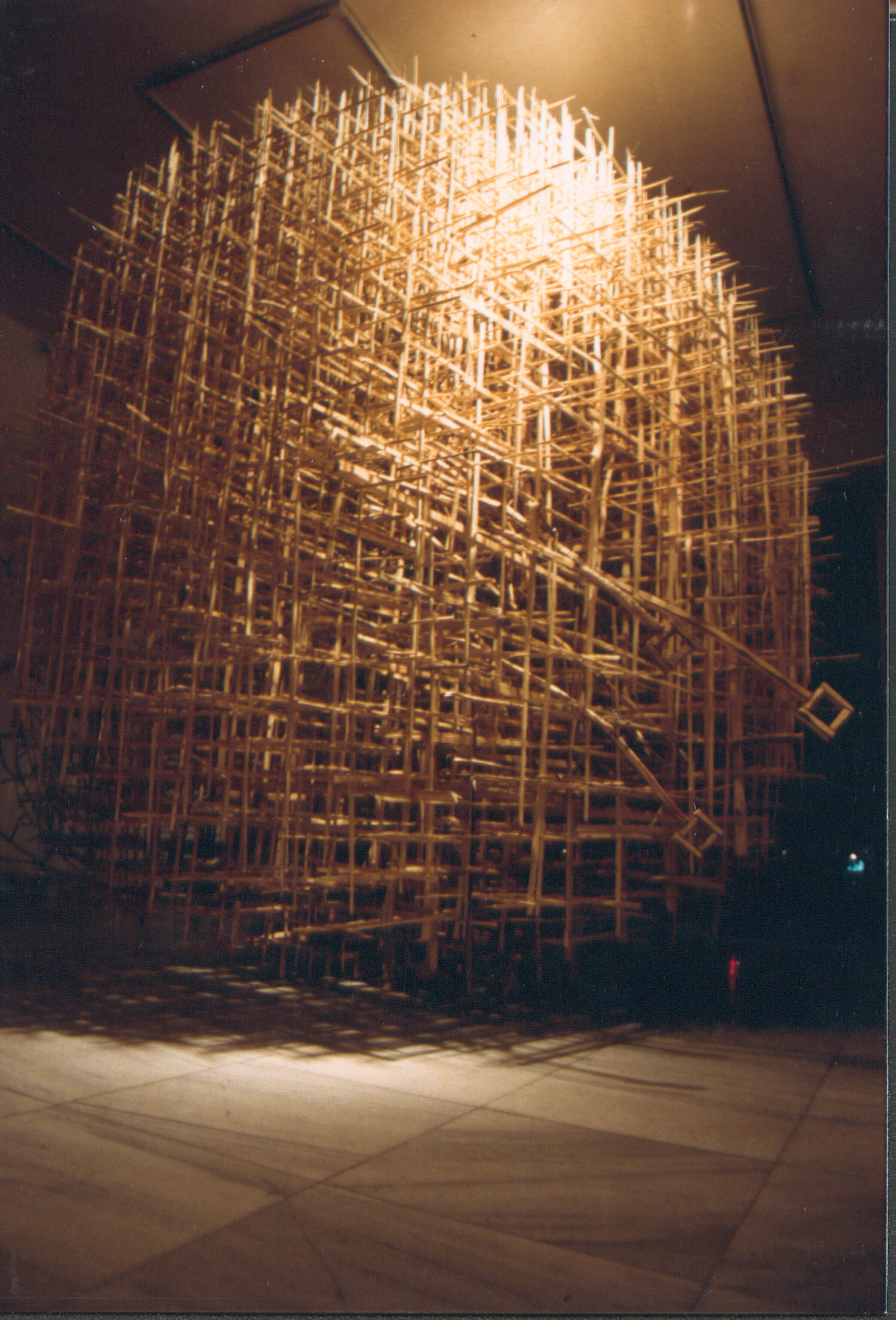 rzeźba typu site specyfik, zbudowana w przestrzeni Galerii Les Punxes w Barcelonie -drzewo- średnica 360 cm